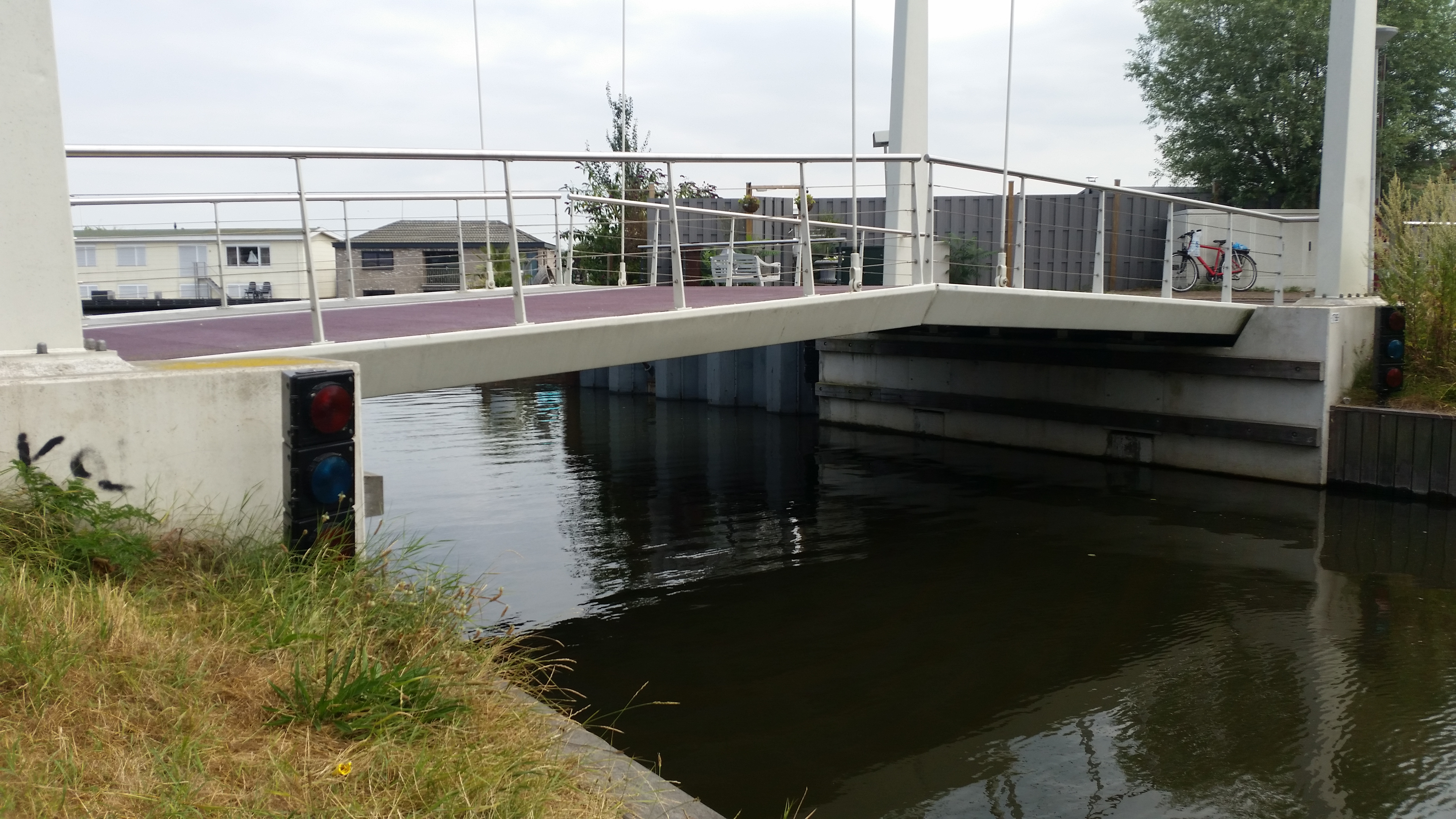 Brug 1796, Druivenbrug, overspanning